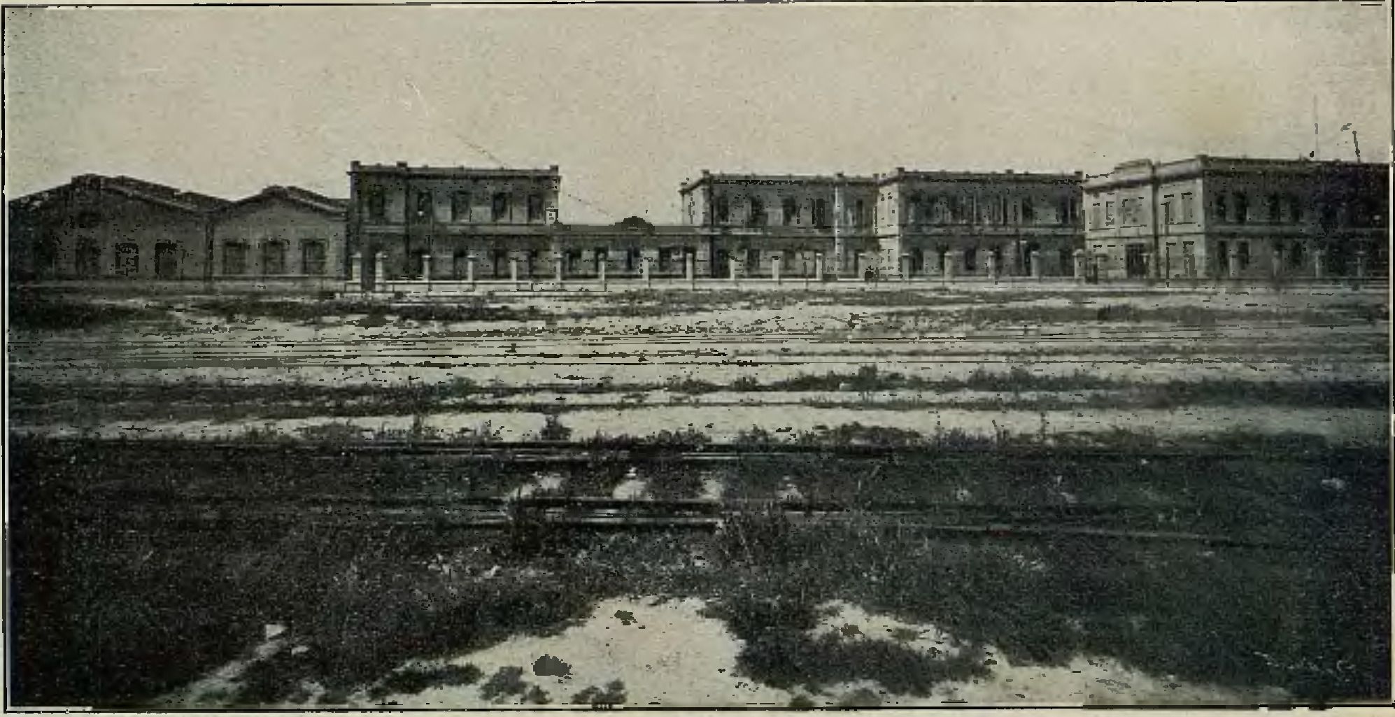 Donado a la Academia por Miguel Mancheño y Olivares. --Sello de tinta con el ex-libris de Miguel Mancheño y Olivares en la portadilla. --`This volume was digitized through a collaborative effort by La Real Academia Hispanoamericana de Ciencias, Artes y Letras and the Joseph P. Healey Library at the University of Massachusetts Boston` Este tomo fue digitalizado gracias a la generosidad de la Real Academia Hispanoamericana de Ciencias, Artes y Letras y la Bibliotecas de la Universidad de Massachusetts Boston por mutuo acuerdo para fomenter la investigacion y el desarrollo del conocimiento y las letras --Palau,30675 --Encuadernación en piel con el escudo de la República Argentina en relieve ocupando todo el plano superior y en el centro, el título en letras doradas ; el nombre del autor en el ángulo inferior derecho de la cibierta. En el plano inferior, plancha dorada en el centro con el escudo de La Argentina. Guardas en papel litrografiado con una rueda dorada --Fotografías en blanco y negro y en color, a plana entera e intercaladas en el texto --Mapa general de la República Argentina